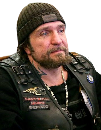 Александр Сергеевич Залдостанов (род.1963) — российский байкер